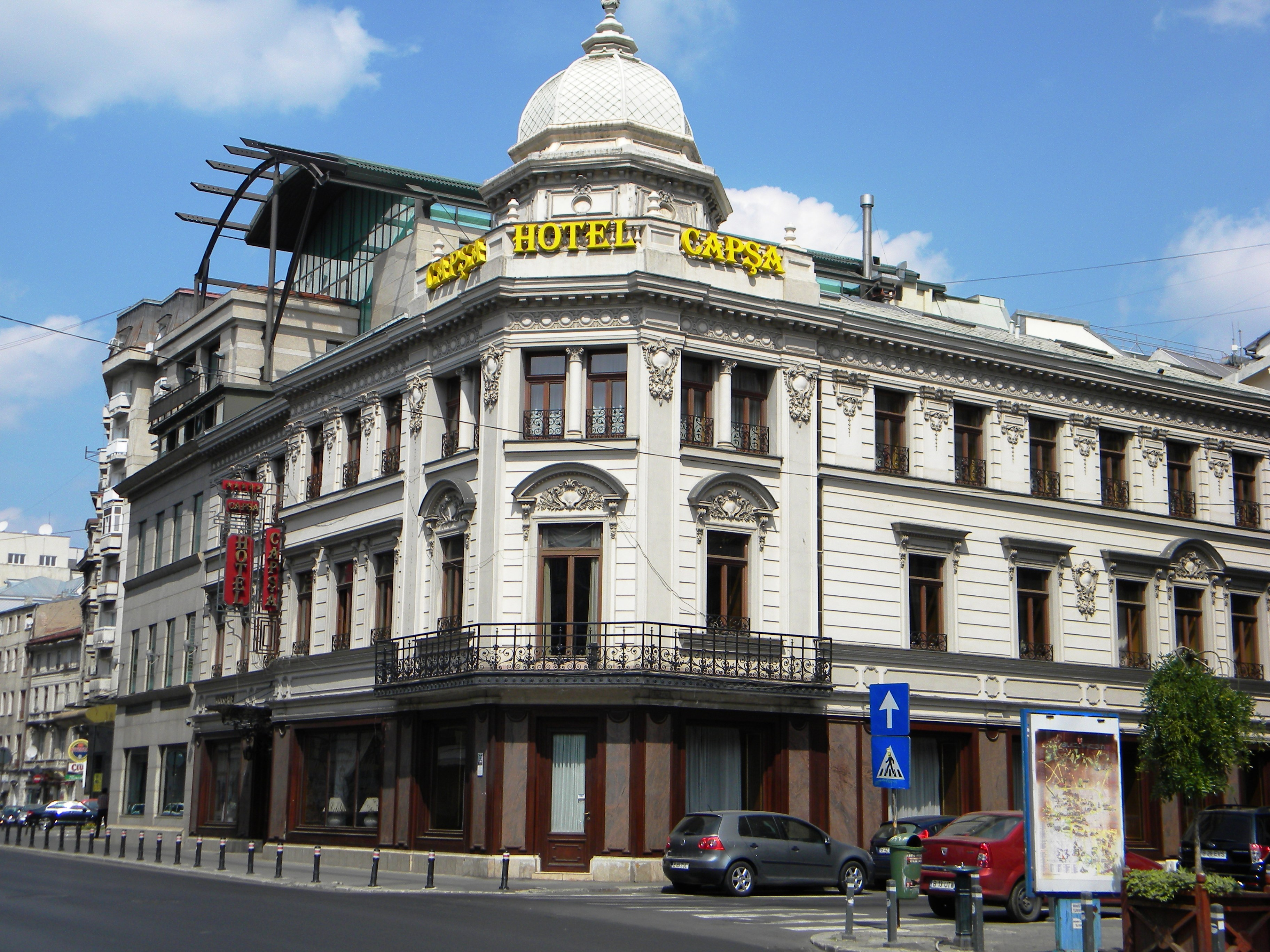 Hotel Capsa, Bucuresti sect. 1, Calea Victoriei - colt cu Str. Edgar